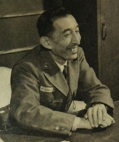 三島通陽